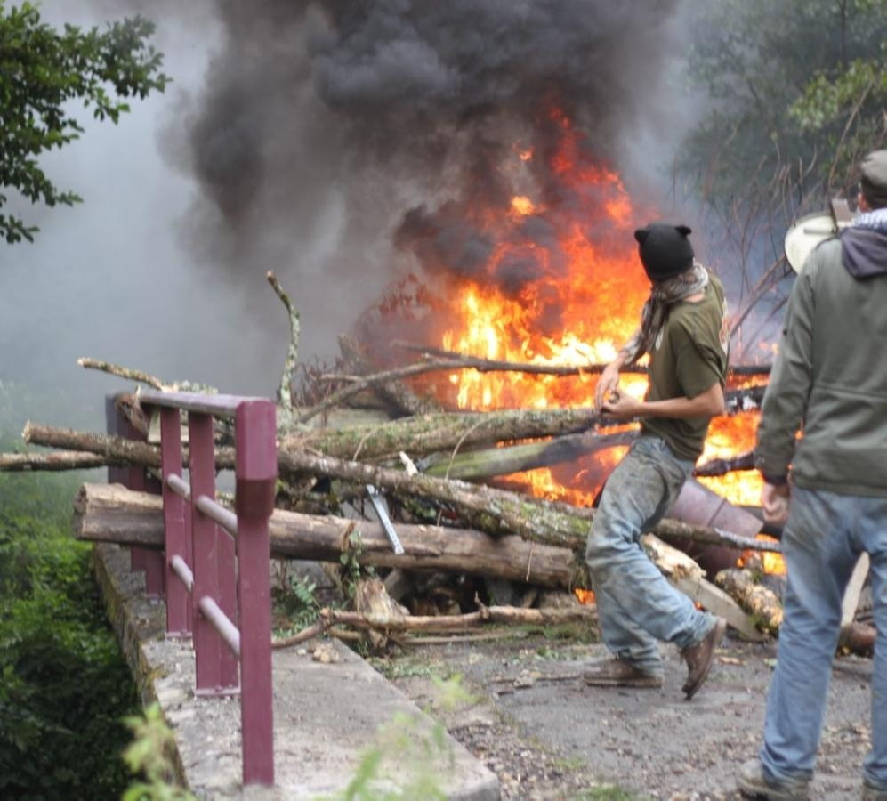 Violence Sivens